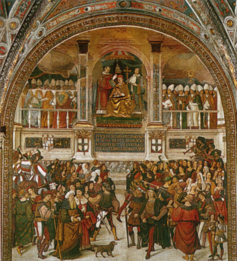 Pinturicchio, incoronazione di Pio III, 1503-1508, duomo di siena